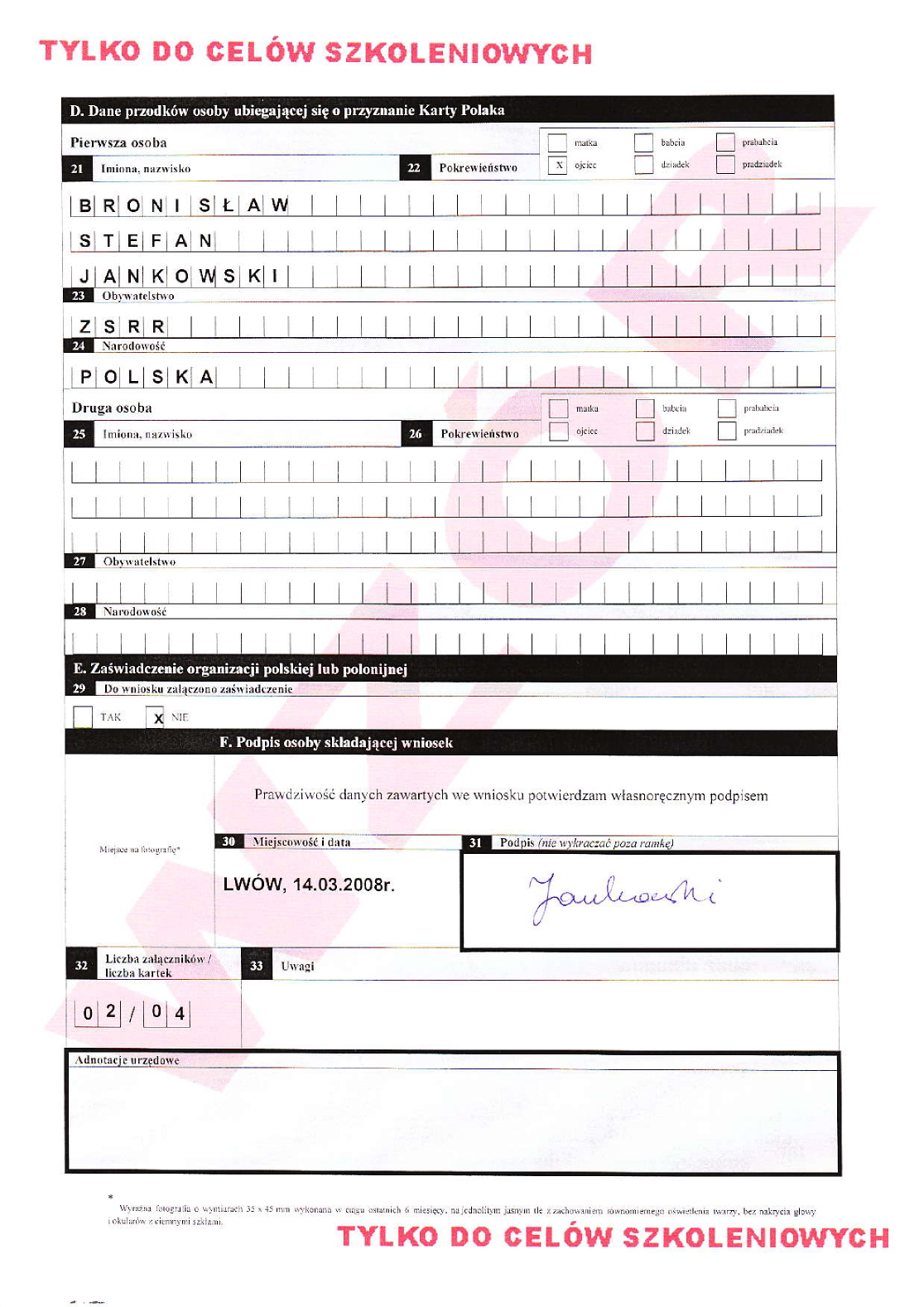 Wzór prawidłowo wypełnionego wniosku o przyznanie Karty Polaka, strona nr 2/2. Wzór wniosku został ogłoszony w rozporządzeniu Rady Ministrów z dnia 4 marca 2008 r. w sprawie określenia wzoru wniosku o przyznanie Karty Polaka oraz wzoru Karty Polaka (Dz. U. z 2008 r. Nr 48, poz. 282}. Wzór prawidłowo wypełnionego wniosku pochodzi ze strony Konsulatu Generalnego Rzeczypospolitej Polskiej we Lwowie. Aby na Karcie Polaka umieszczono nazwisko według polskiej pisowni, należy umieścić je w polu nr 1 przed nazwiskiem z dokumentu tożsamości, oddzielając je ukośnikiem, np. Kostecki / Kostetskyi. Na podpis może składać się zarówno nazwisko jak i imię oraz nazwisko.